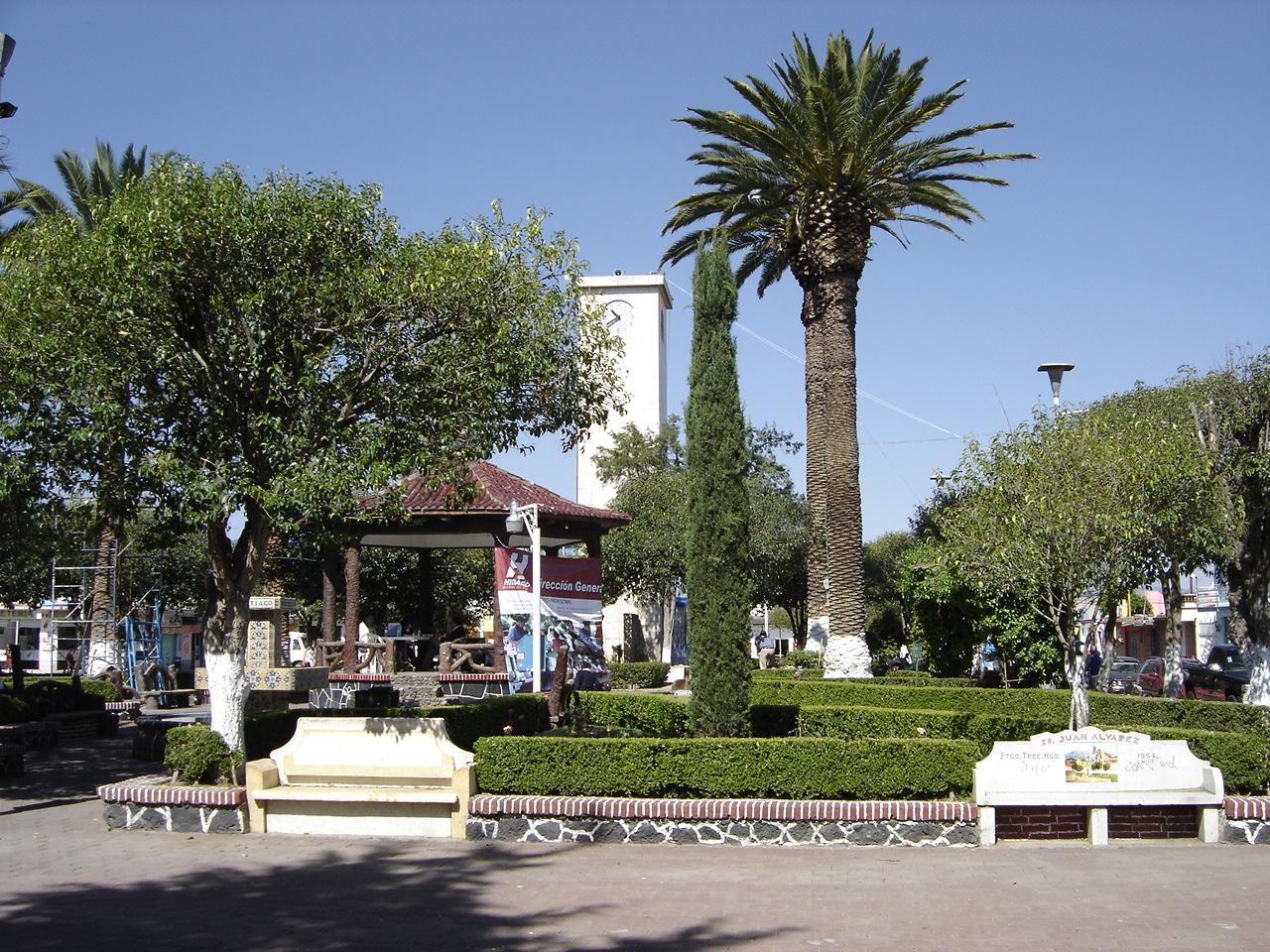 Jardin del Centro de Santiago Tulantepec al fondo se Observa el Reloj.